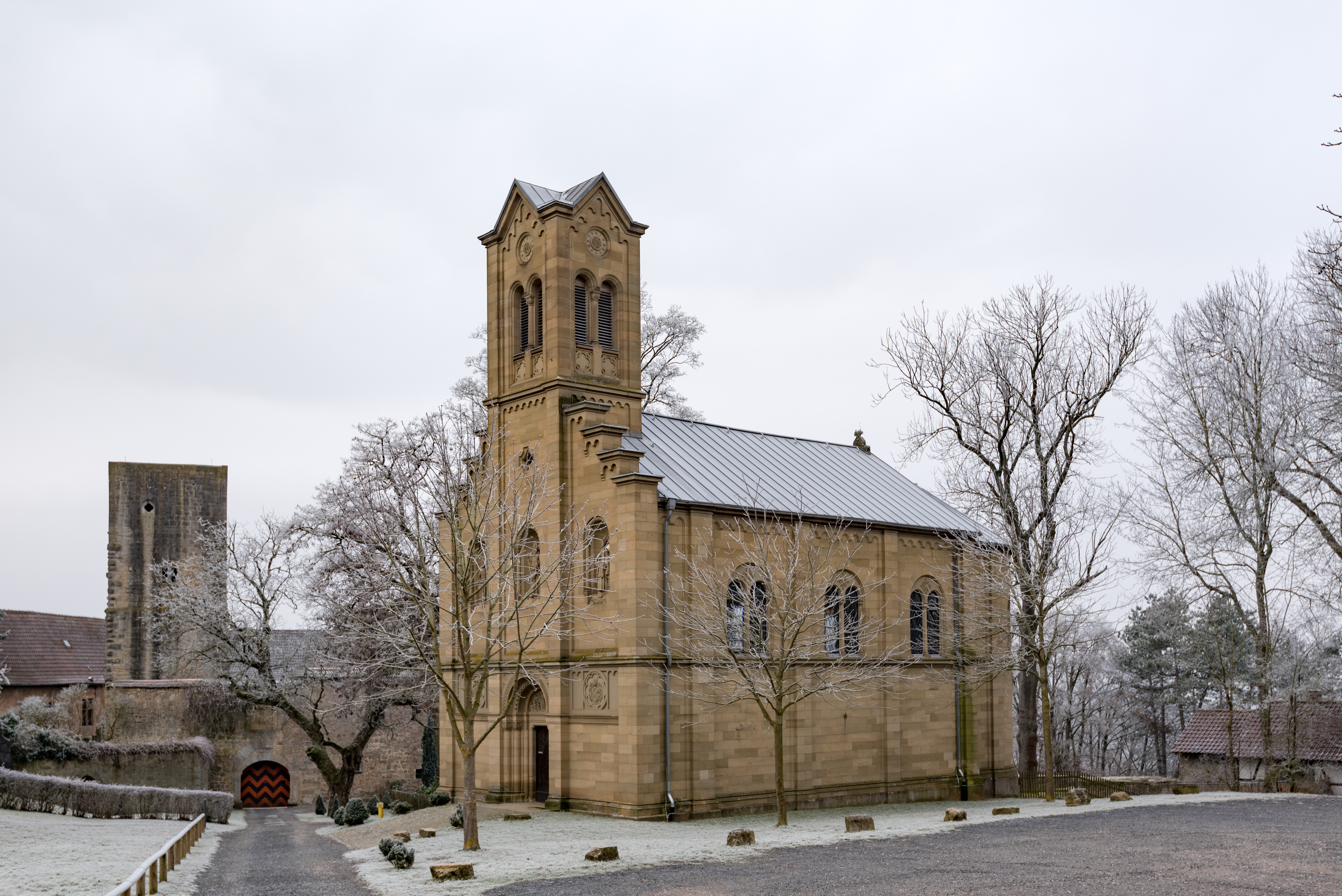 Bad Neustadt an der Saale, Salzburg, Ansitz A und St. Bonifatius